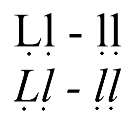 che vaqueira lletra